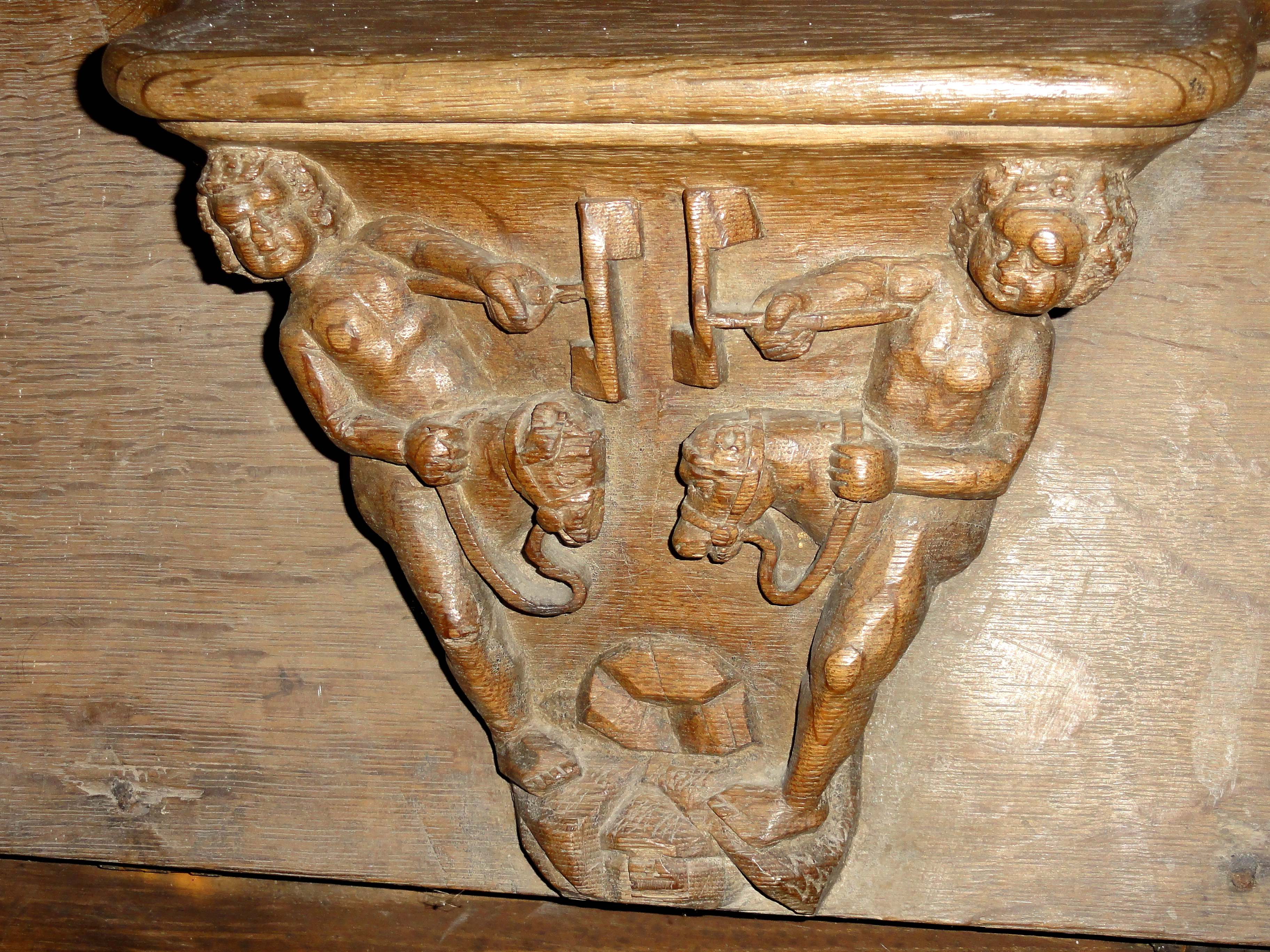 Miséricorde (voir titre) ; numérotation dans le sens des aiguilles de l'horloge en commençant par le 2e rang (n° 1 à 20), et en continuant par le 1er rang (n° 21 à 32).